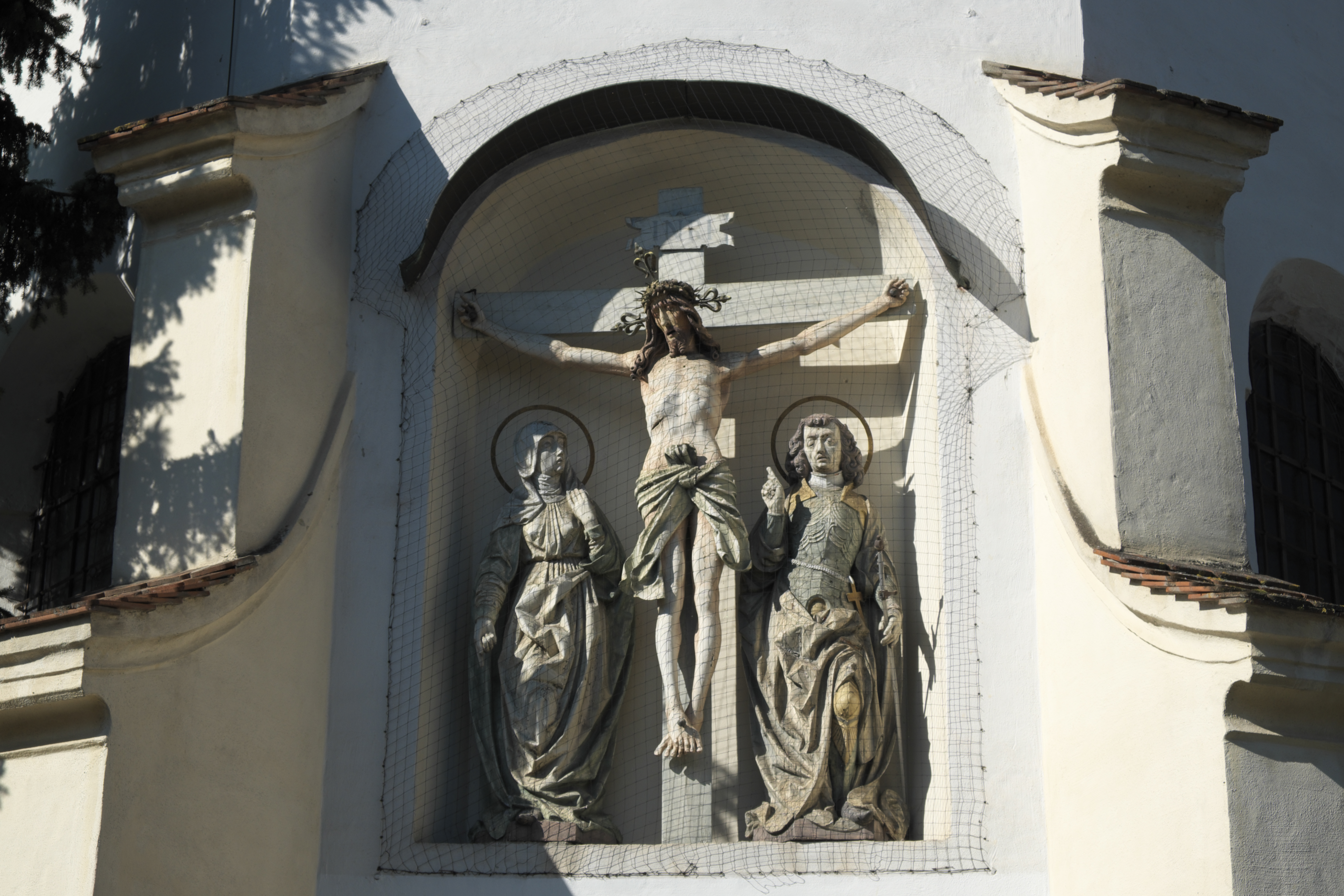 Katholische Pfarrkirche St. Martin in Jengen im Landkreis Ostallgäu (Bayern/Deutschland), Kreuzigungsgruppe aus dem Anfang des 16. Jahrhunderts, Assistenzfiguren aus dem 18. Jahrhundert